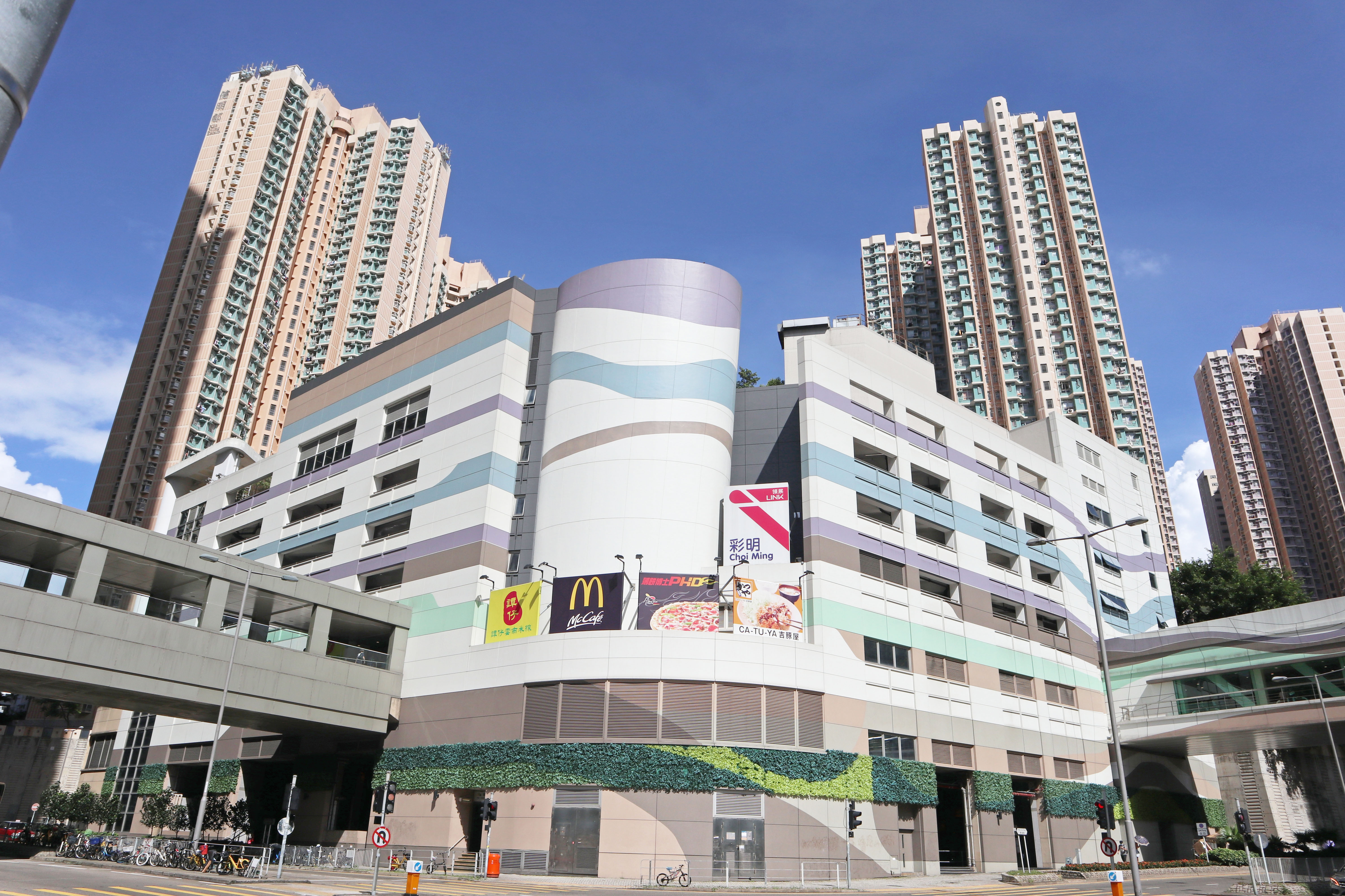 調景嶺彩明商場二期新貌